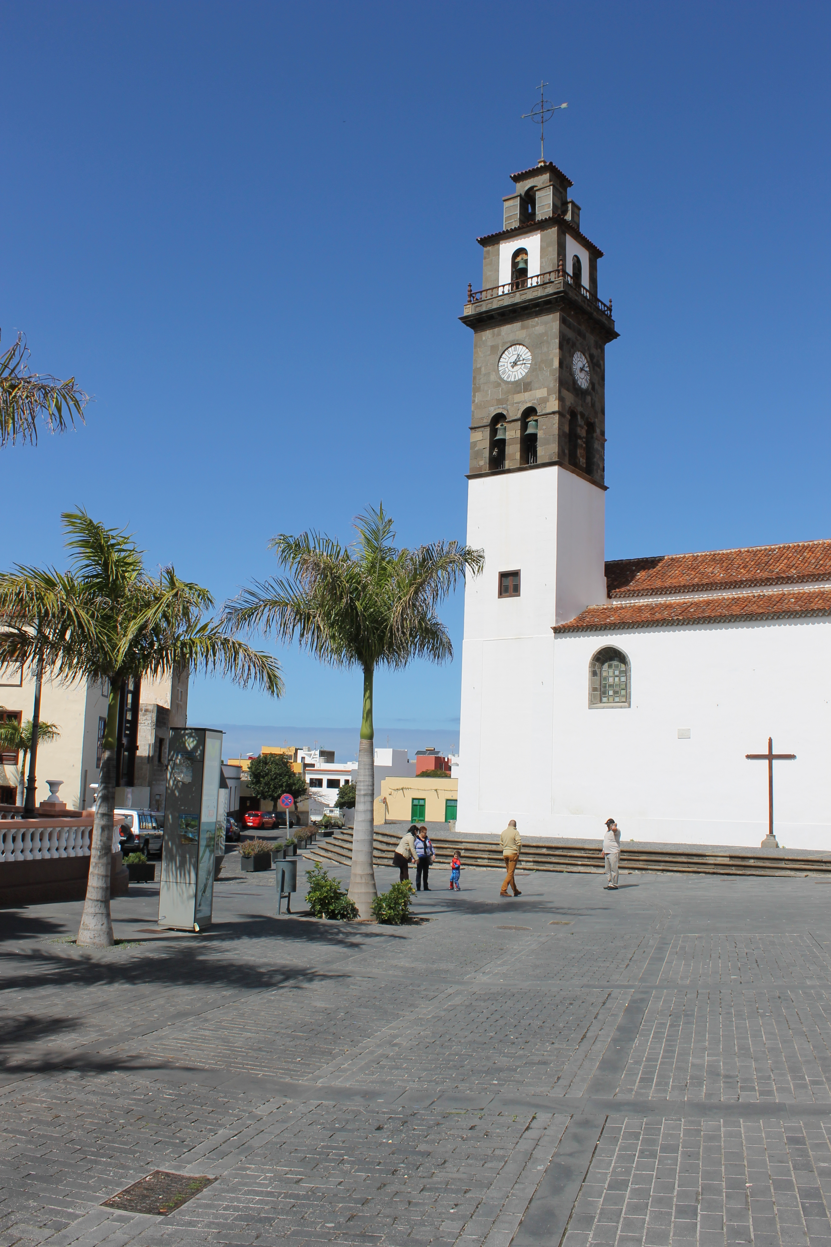 Buenavista del Norte